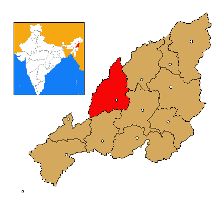 Mapa de localización del distrito